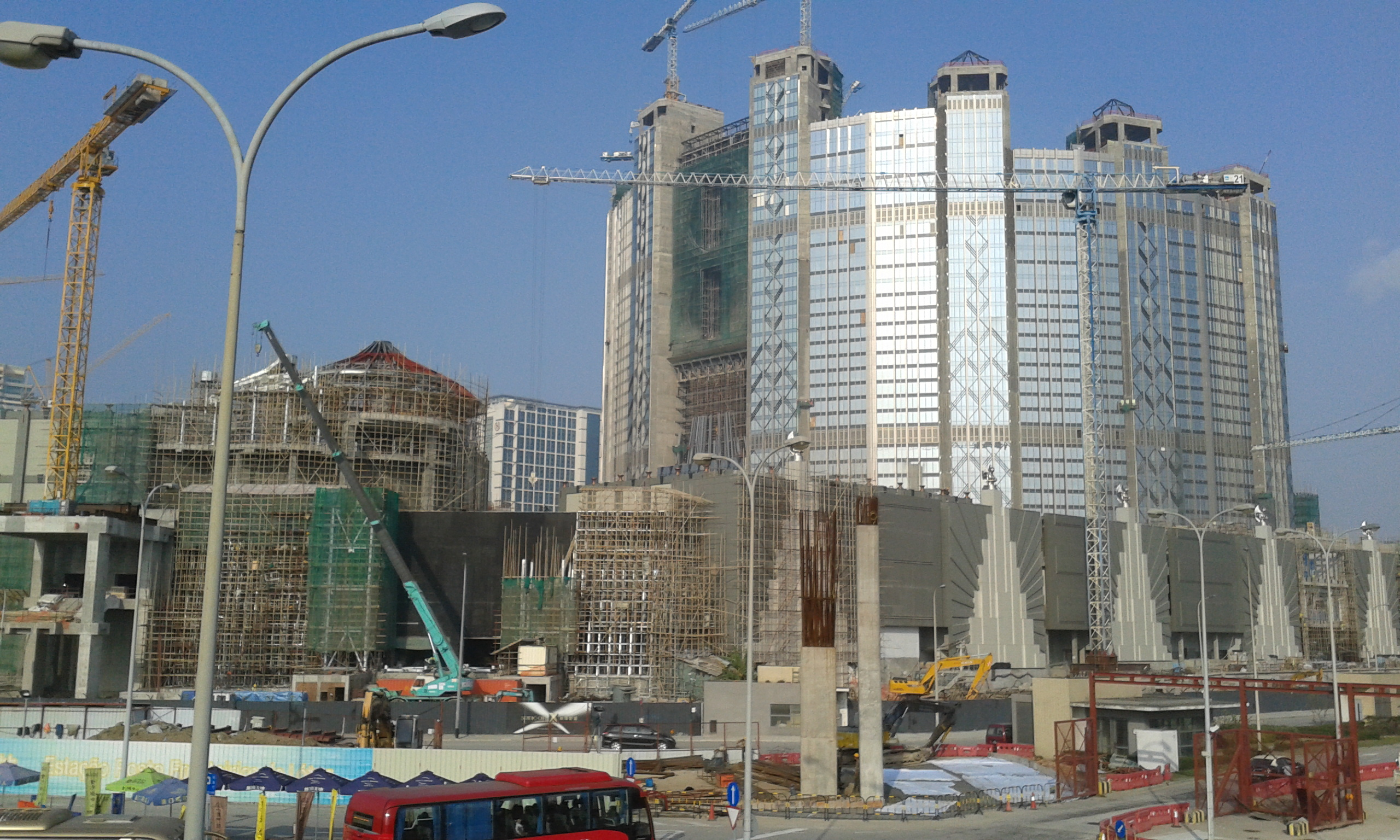 興建中的新濠影匯